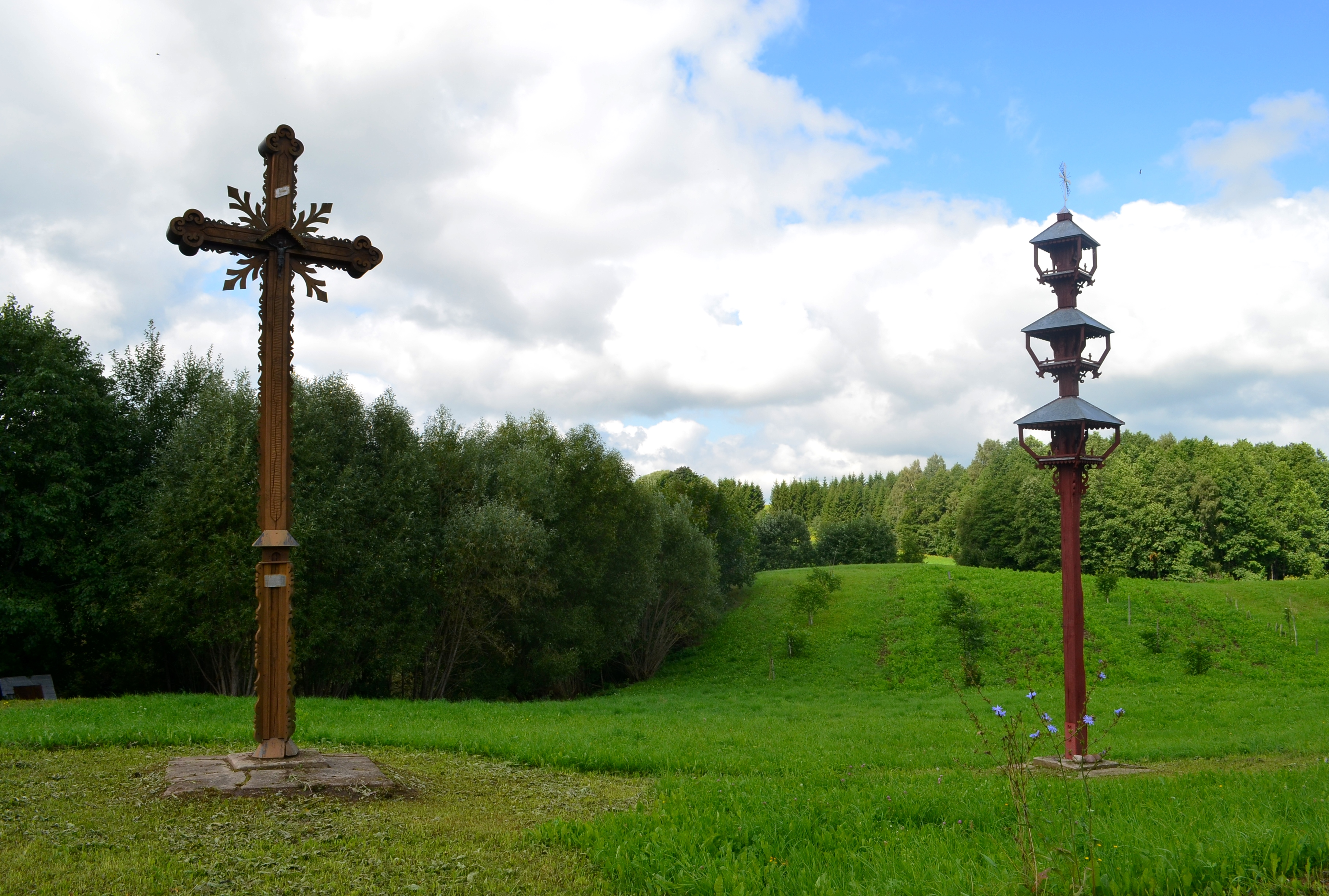 Kryžius ir stogastulpis, Šiaudiniškio k., Utenos raj.